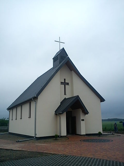 Kościół Ewangelicki Apostołów Piotra i Pawła w Nasalach